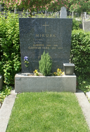 Wiener Südwestfriedhof-Gertrud Ferra-Mikura